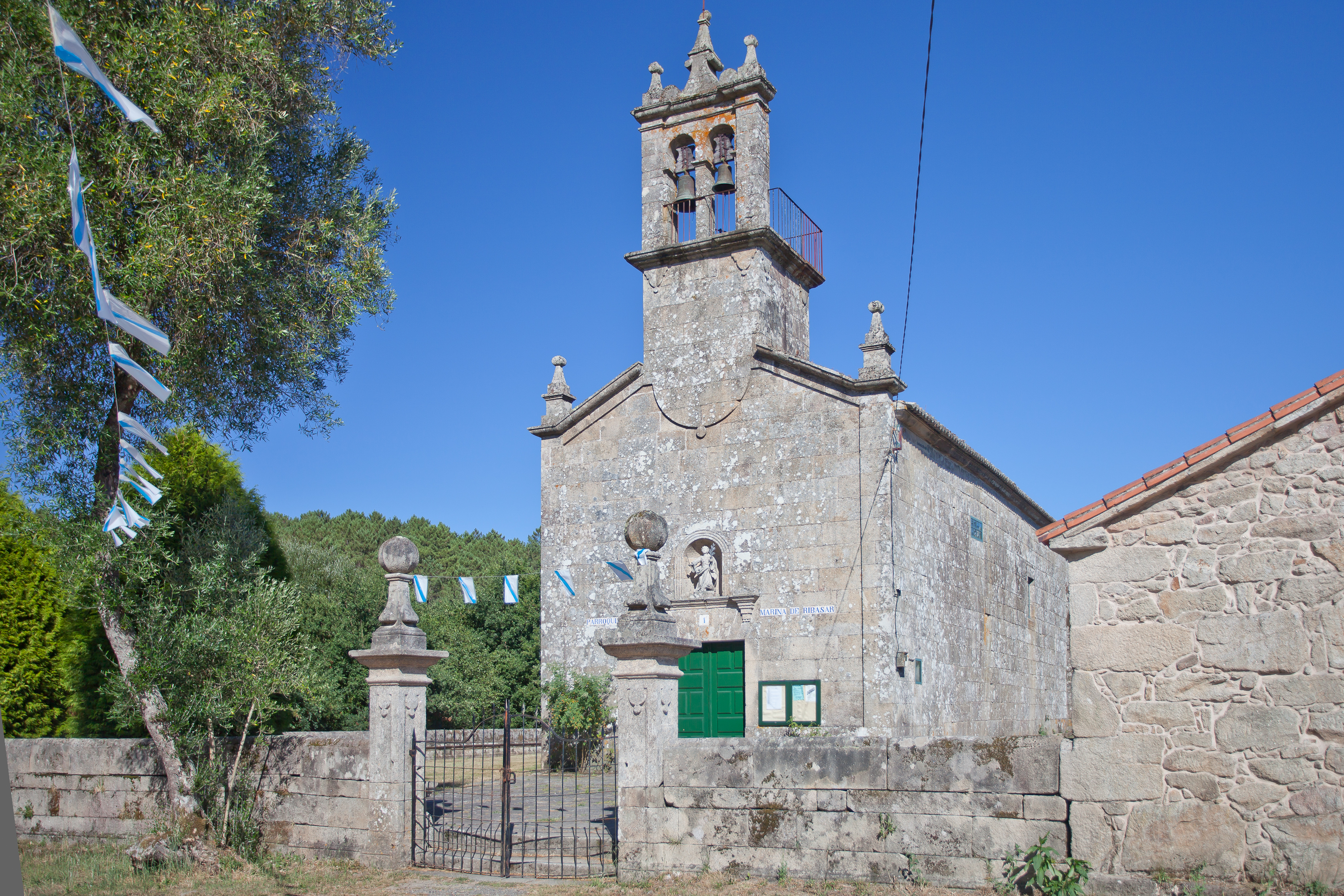 Igrexa de Santa Mariña de Ribasar, Rois, Galicia